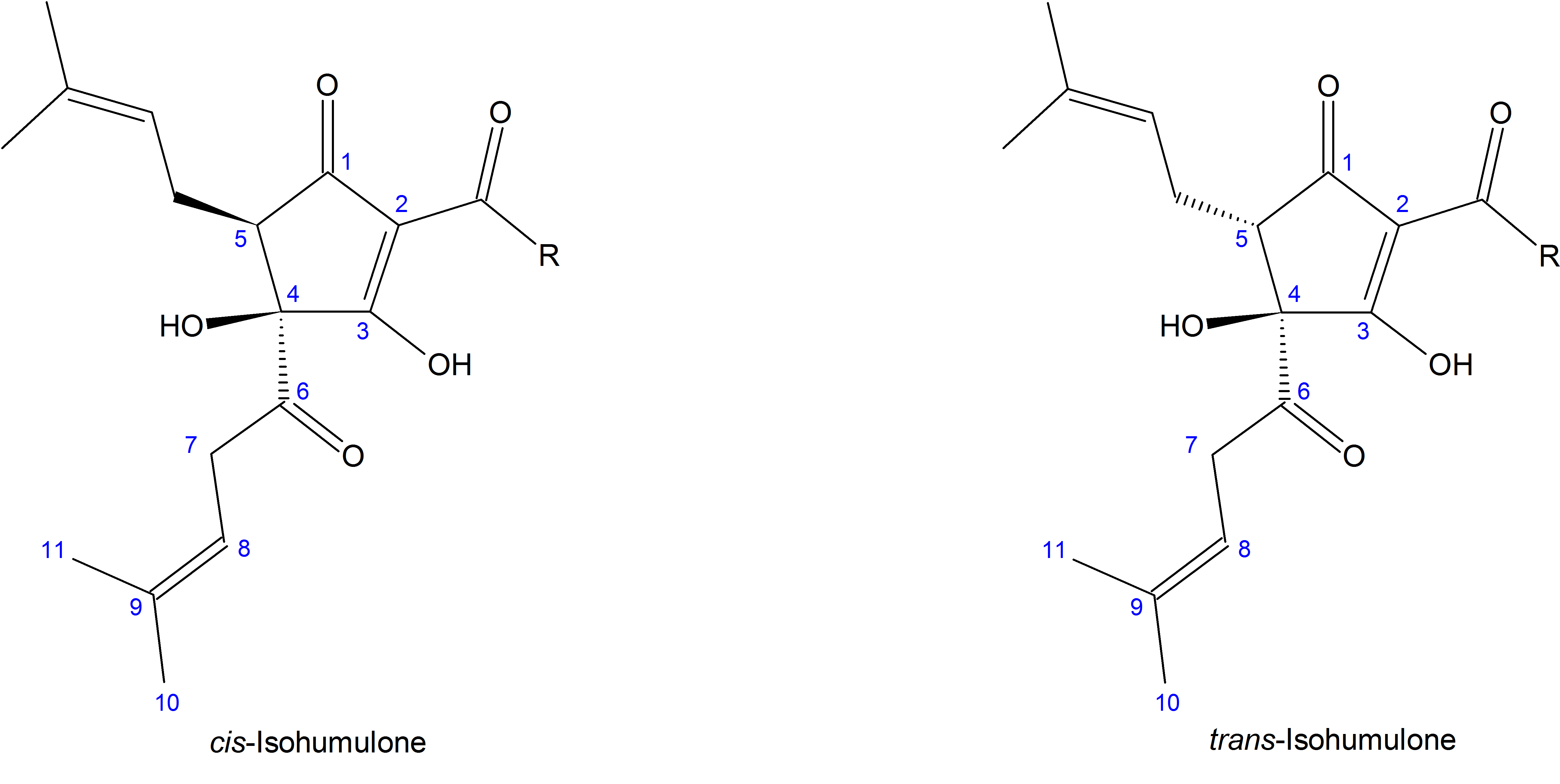 cis- und trans-Isomere der Isohumulone